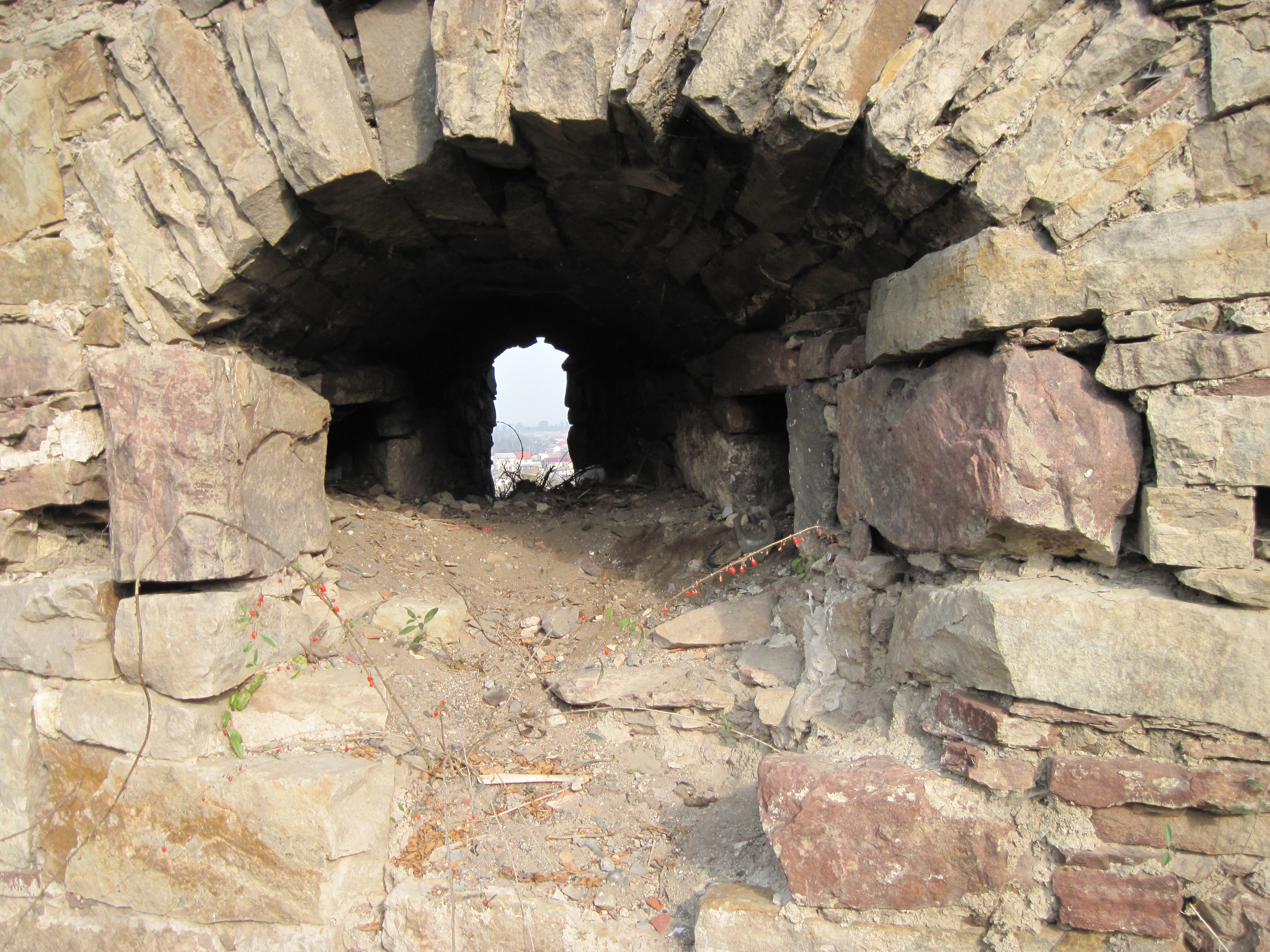 Бійниця Бучацького замку